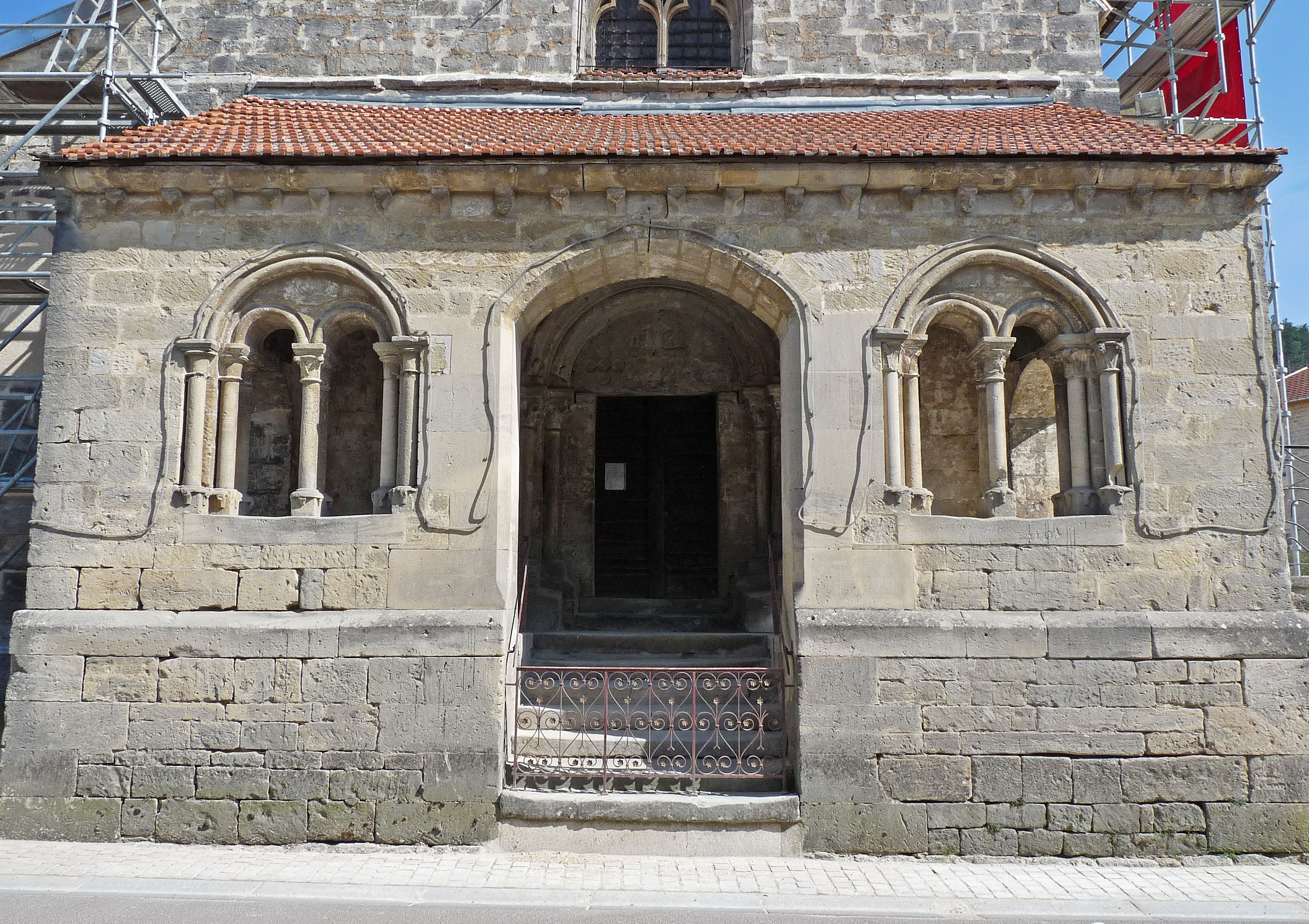 Porche occidental de l'église paroissiale de la Sainte-Croix à Suzannecourt (Haute-Marne), en travaux.